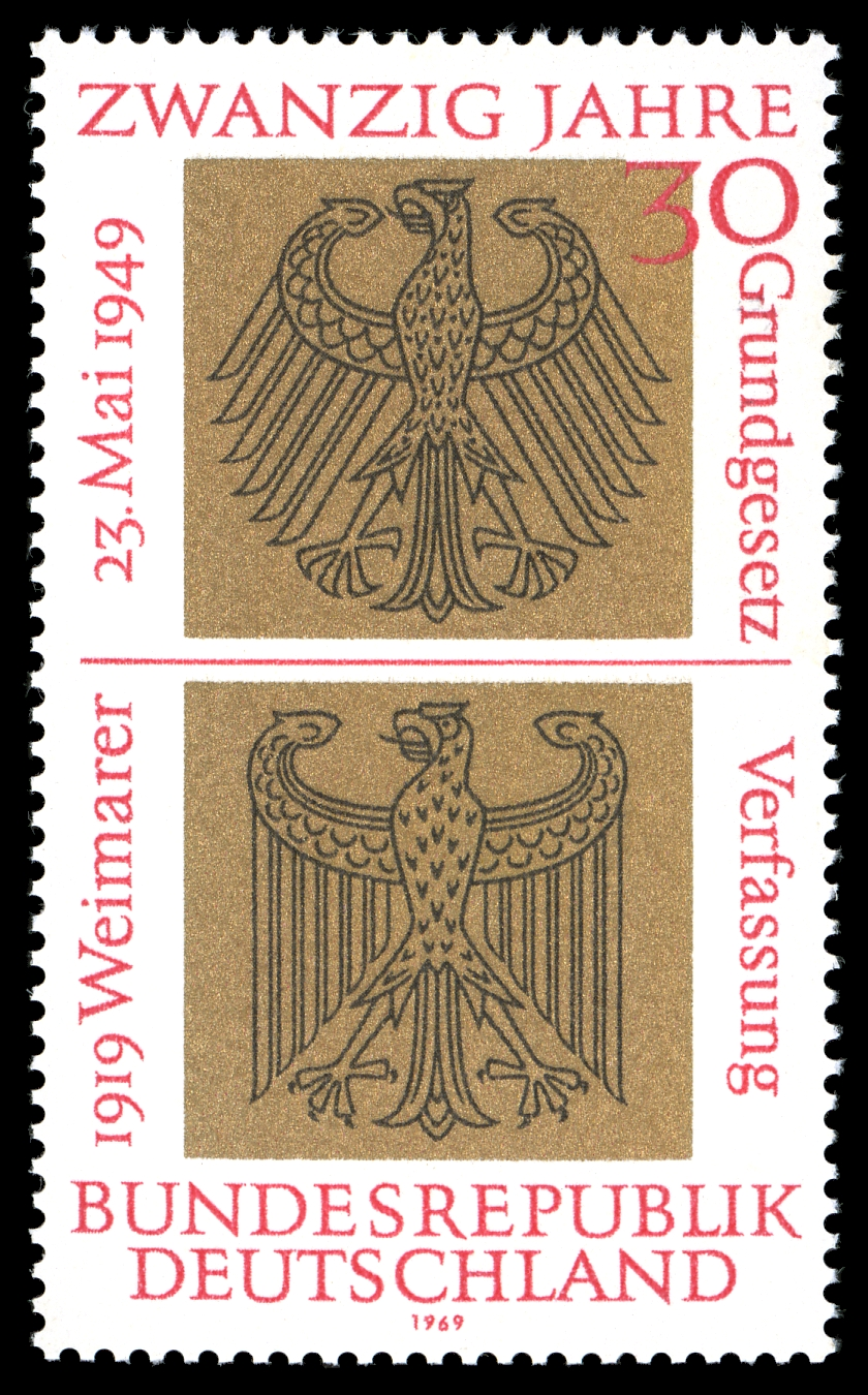 German stamp